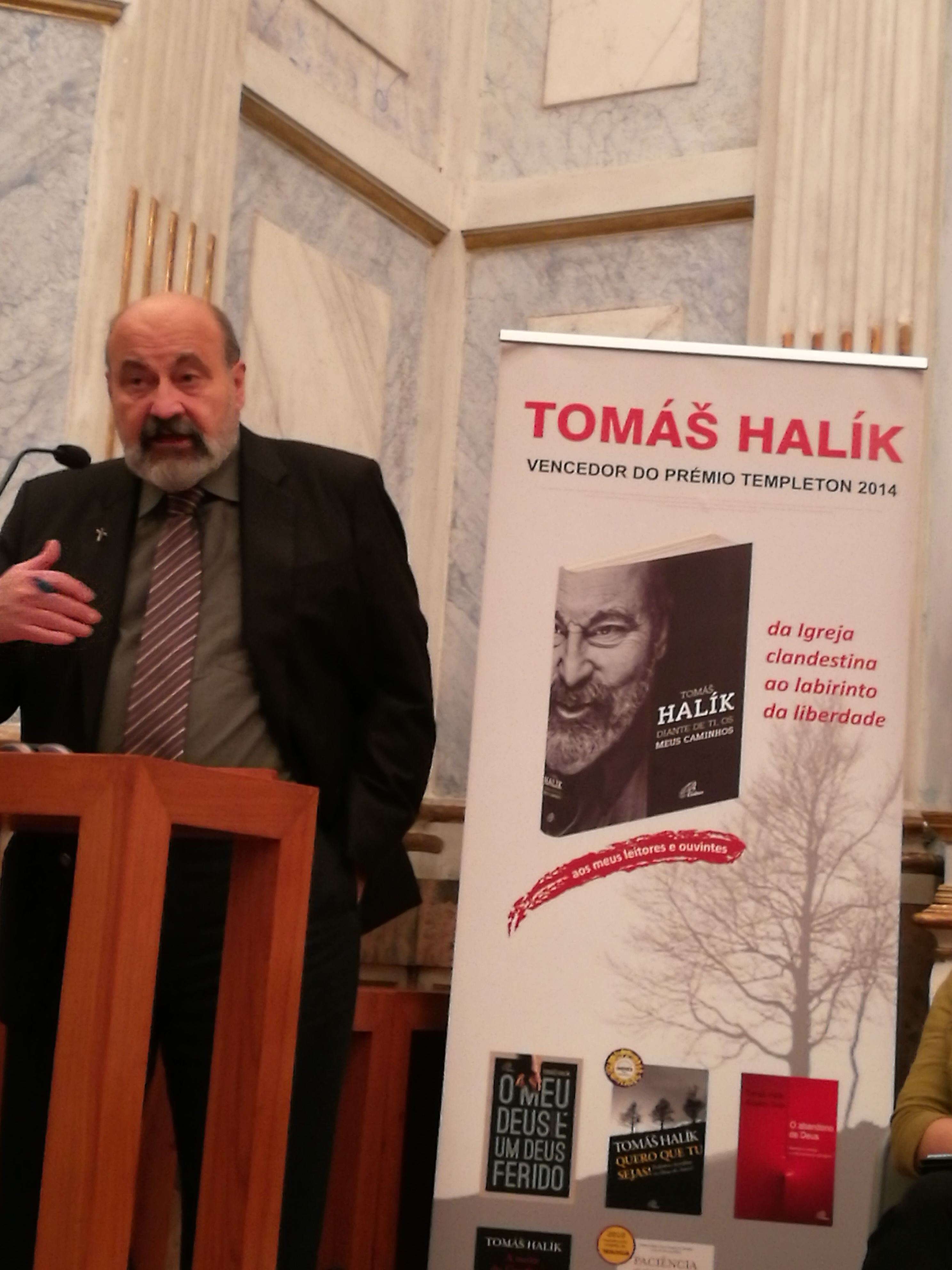 Mgr Tomáš Halík présentant l'édition portugaise de son dernier livre à LIsbonne le 22.11.2018